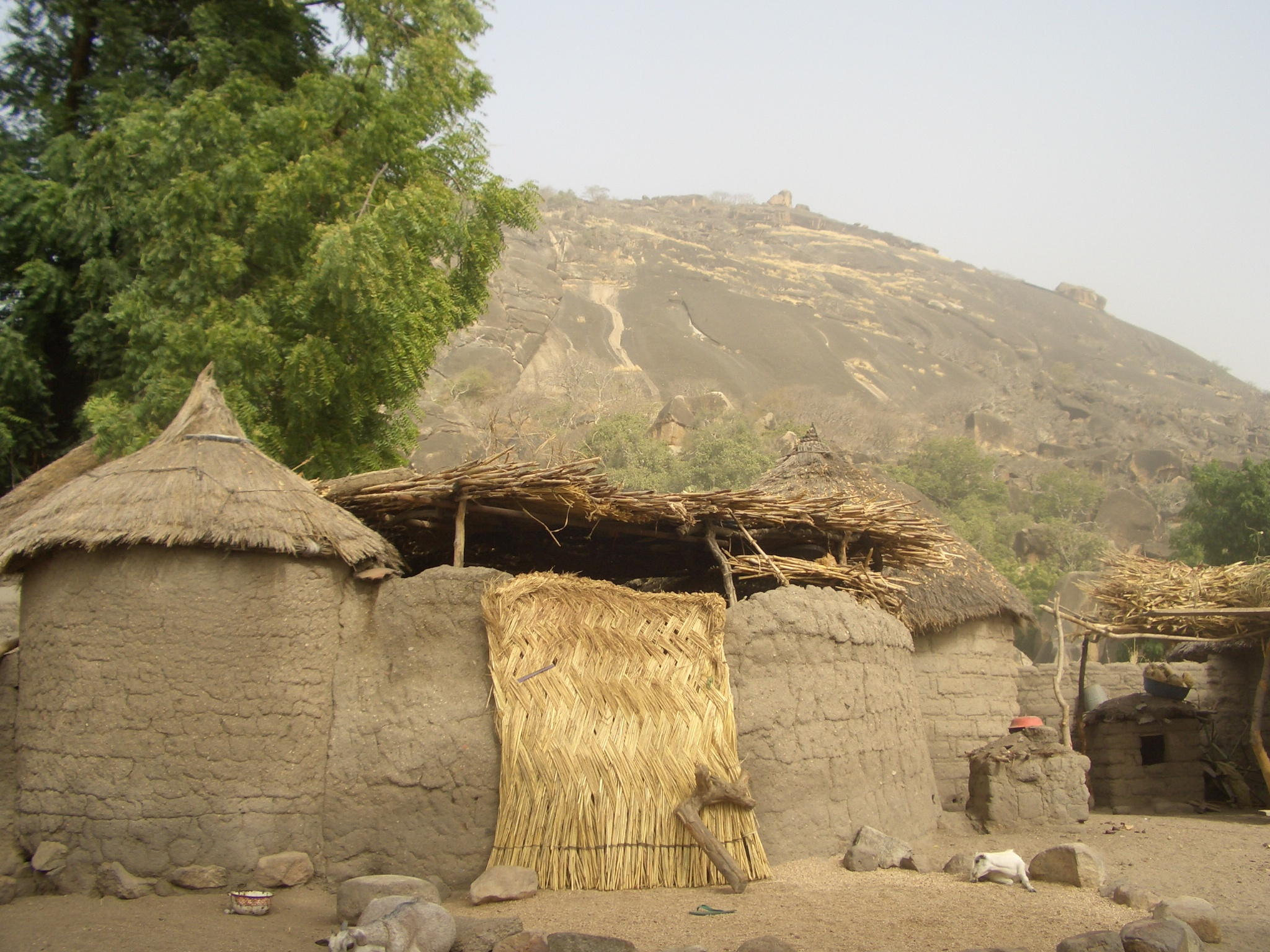 Boboyo(Kamerun), Haus eines Hofes